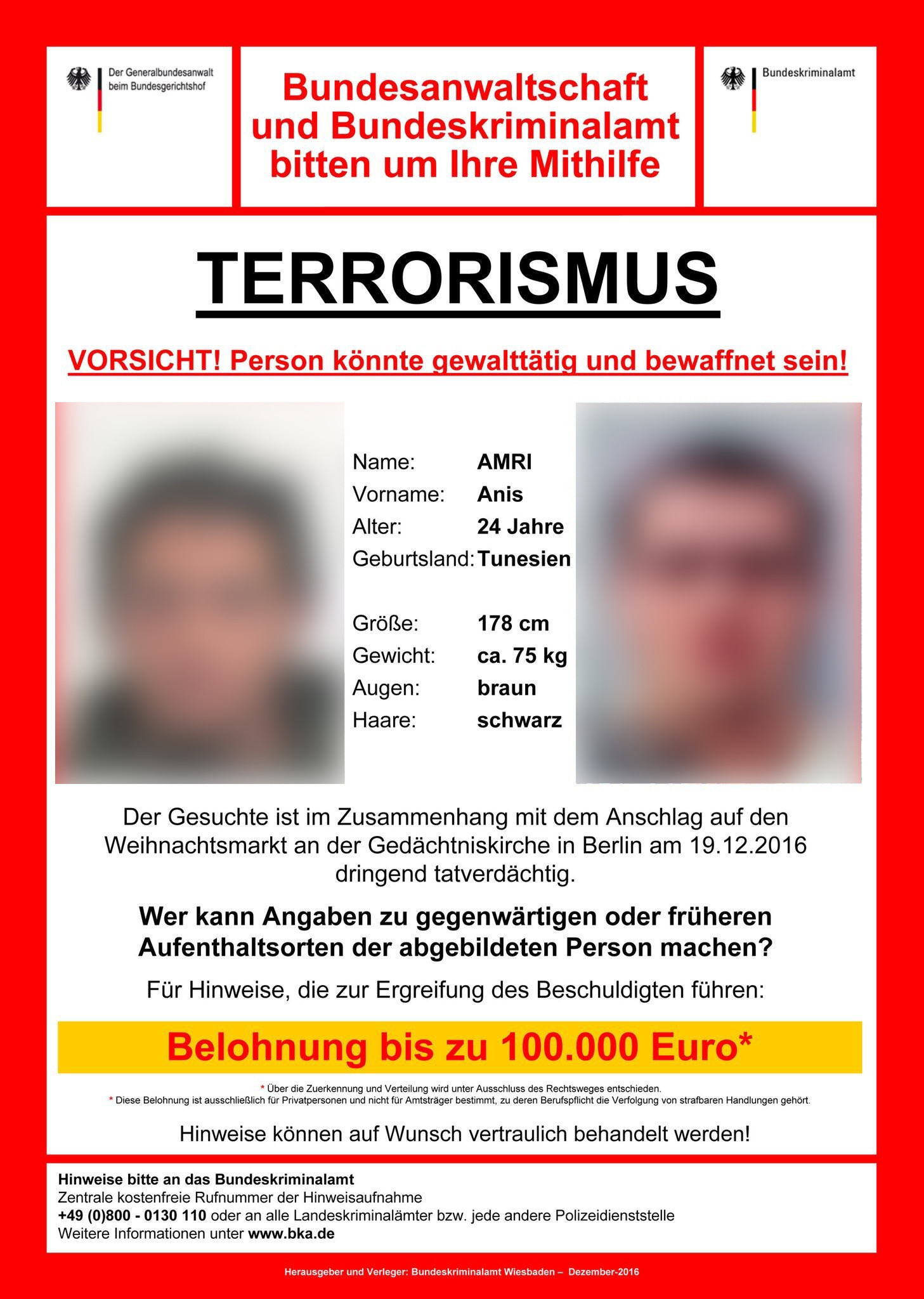 zatykač na Amriho (neoriginální - rozmazané fotky z důvodu autorských práv)